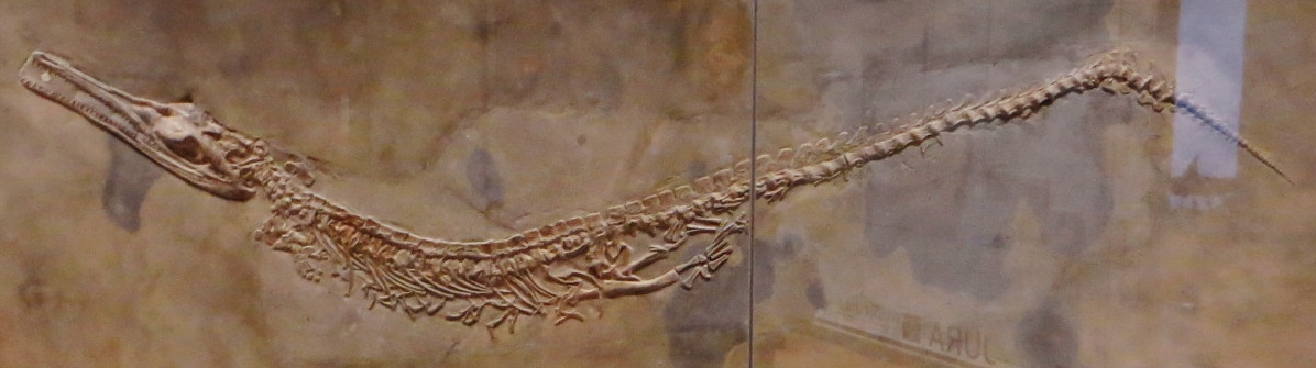 Fossil of Geosaurus - Took the picture at Museum am Lowentor, Stuttgart